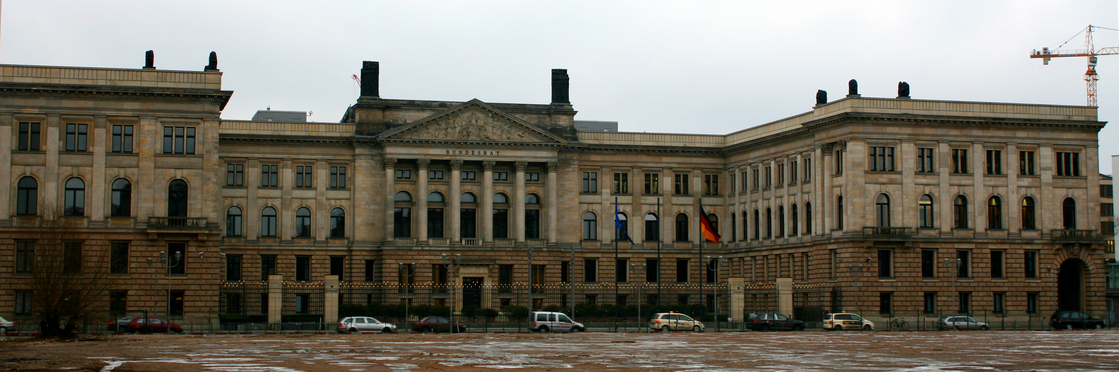 Preußisches Herrenhaus, Seat of the Bundesrat, Berlin, Germany